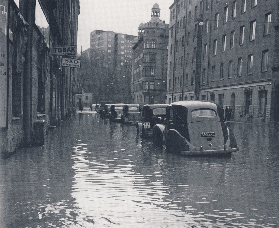 Översvämmning från vattenläckage i Vanadislundens vattentorn i Stockholm